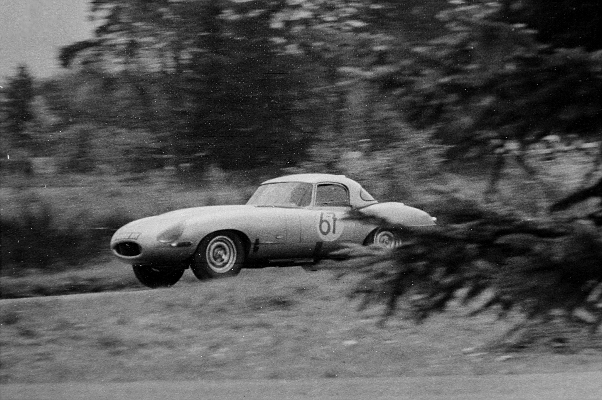 Jaguar E-Type von Peter Lindner/Peter Nöcker beim 1000-km-Rennen auf dem Nürburgring (ausgangs Südkehre)